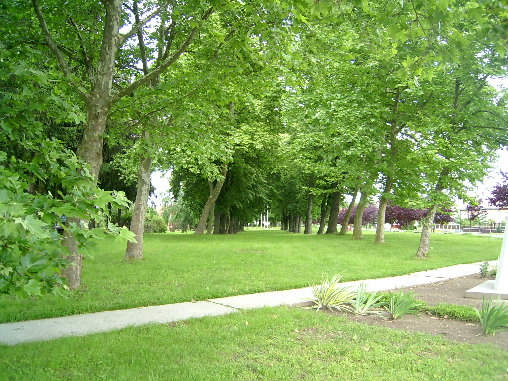 Mezőcsokonya, park